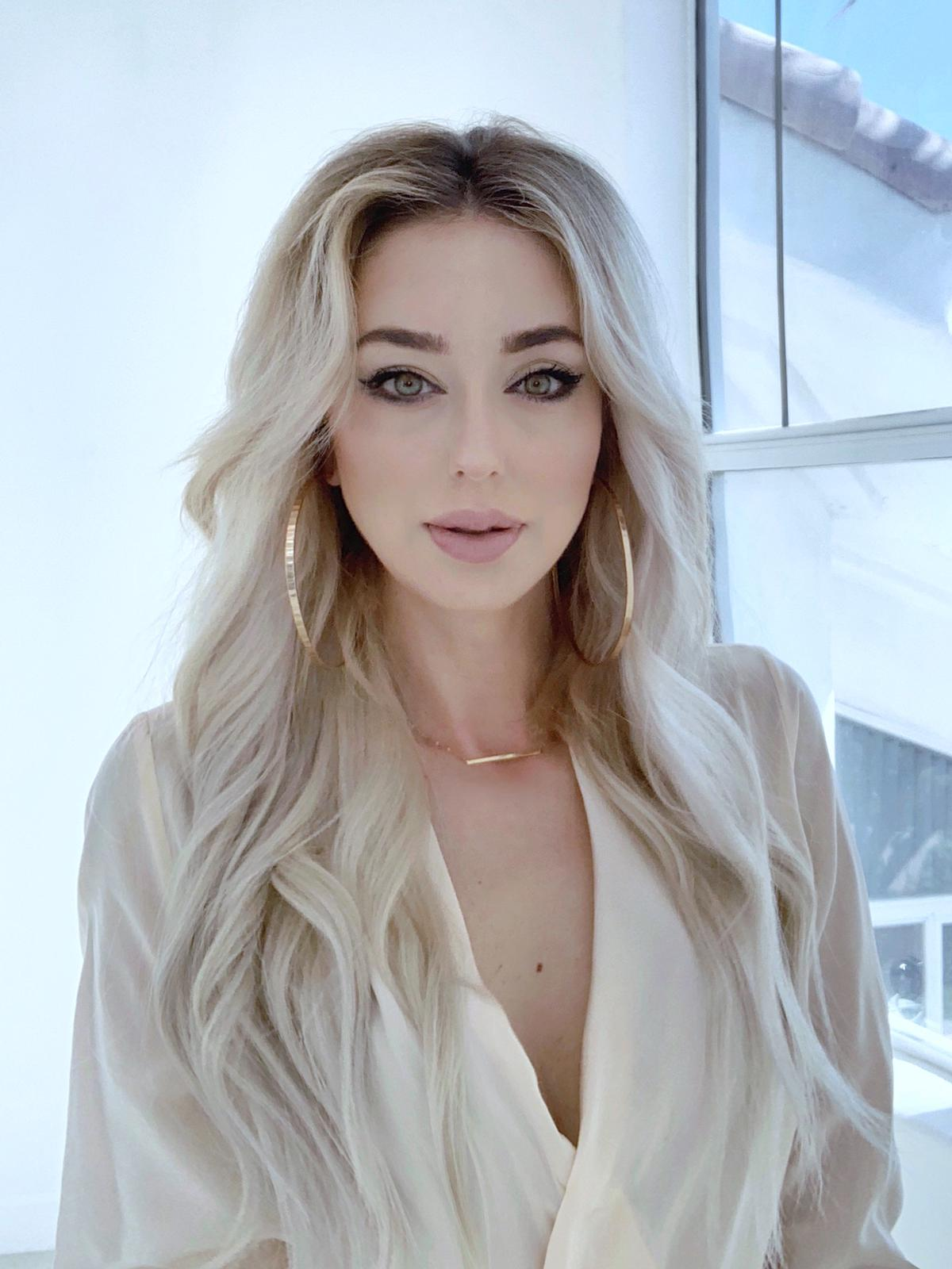 مارینا بربریان Marina BerBeryan